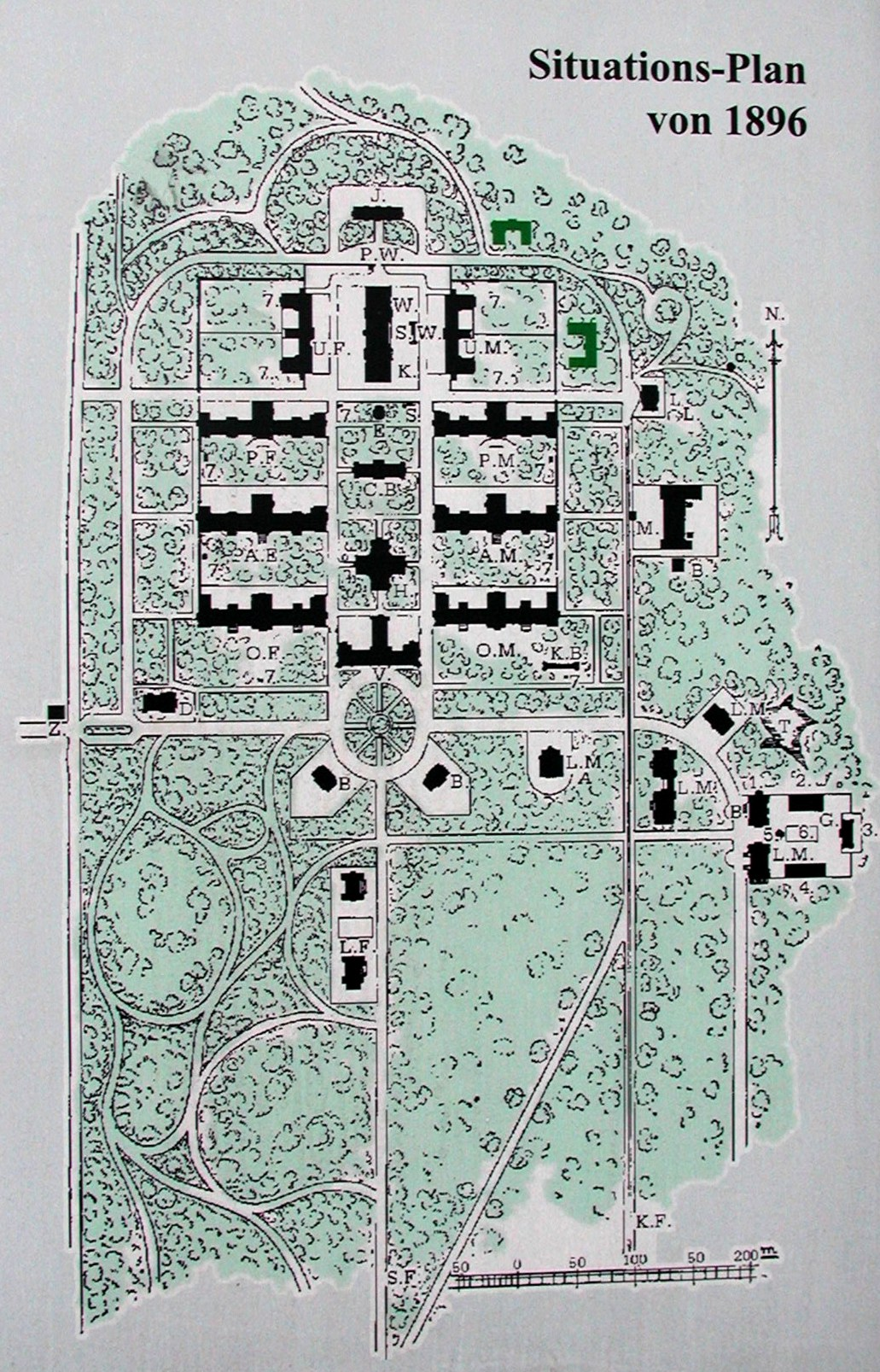 Plan von 1896 (2)